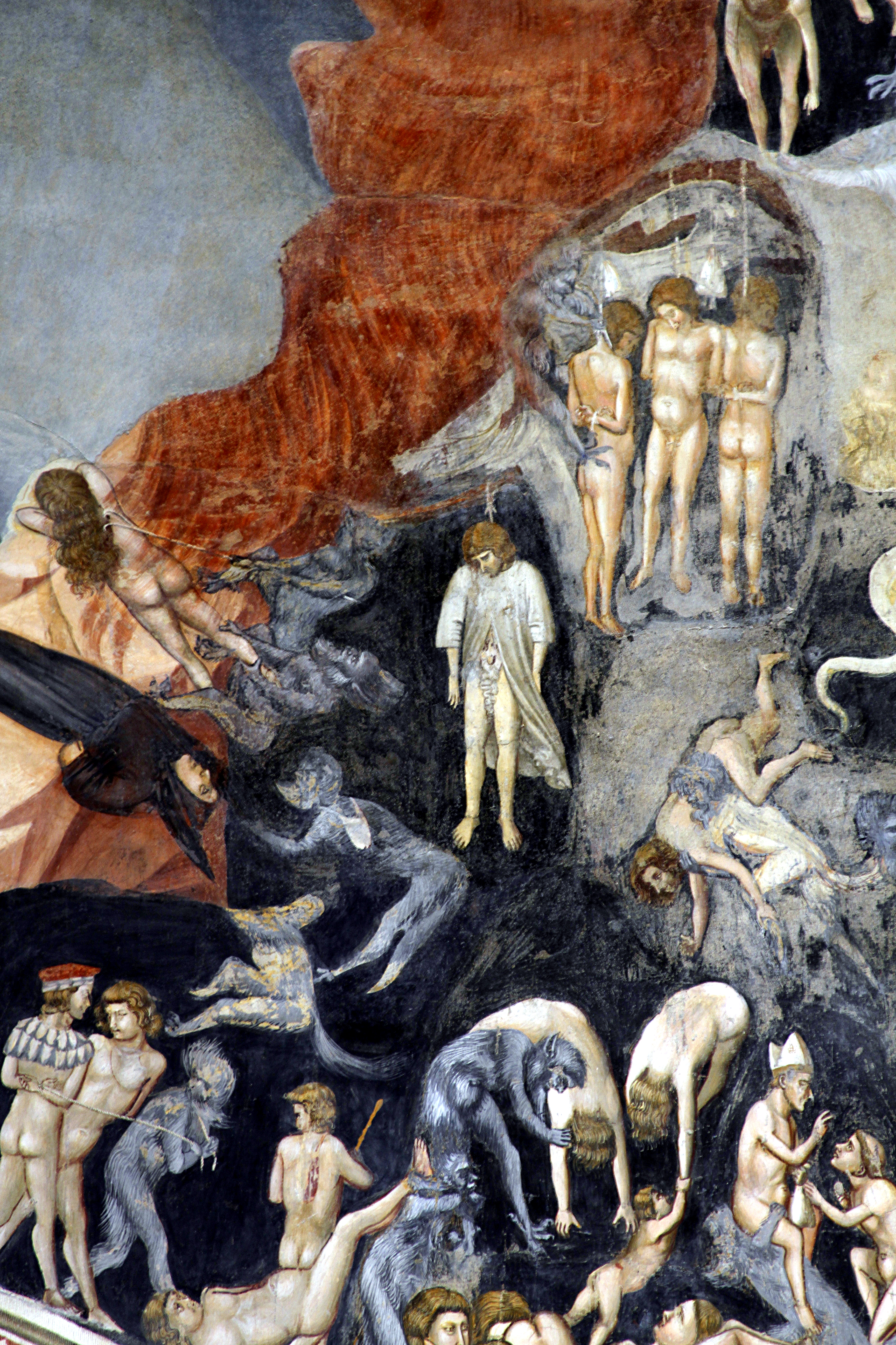 Capella dei Scrovegni - Padua